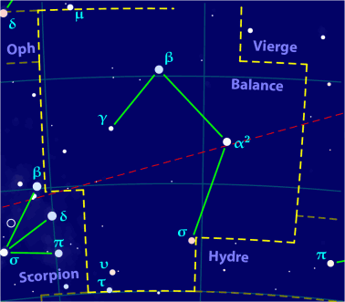 Carte pour la constellation Balance Produite à l'aide du logiciel PP3